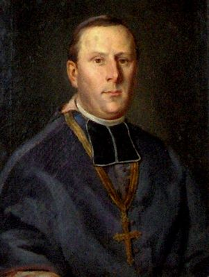 Wincenty Teofil Popiel - 71 biskup płocki (1863 -1875)